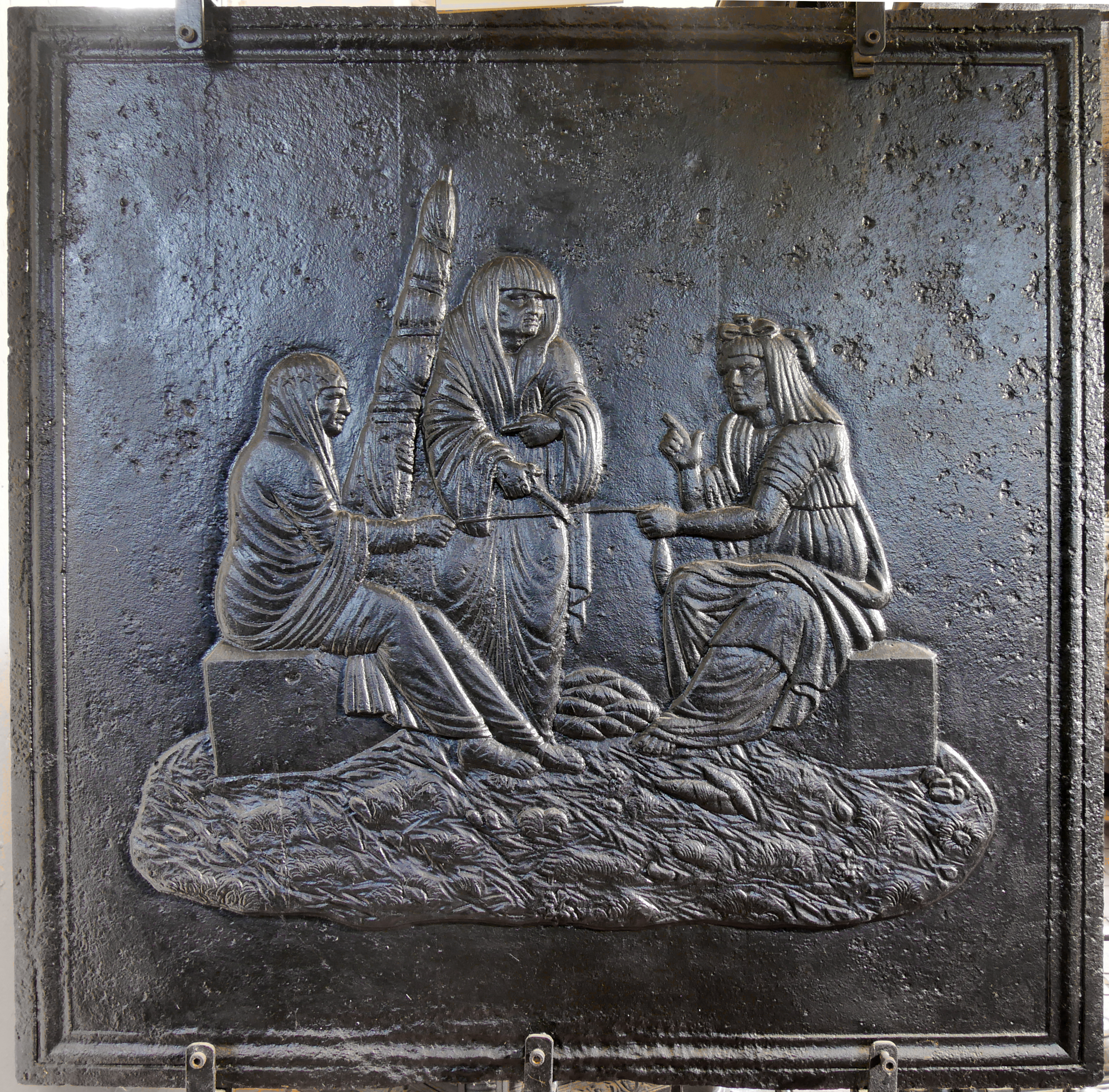 Takenplatte oder Kaminplatte mit dem Motiv "Drei Parzen", Parzen, die den Lebensfaden spinnen und abschneiden als Symbol für die Endlichkeit des Lebens. Die Parzen (lateinisch Parcae) sind in der römischen Mythologie die drei Schicksalsgöttinnen, die den drei Moiren der griechischen Mythologie entsprechen. Sie können gemeinsam oder auch einzeln agieren; gemeinsam haben sie Einfluss auf den Lebensfaden. Die Parzen heißen Nona (neunte), Decima (zehnte) und Parca (Geburtshelferin. Nona spinnt den Lebensfaden, Decima entscheidet über das Lebensgeschick, Morta durchtrennt den Lebensfaden.